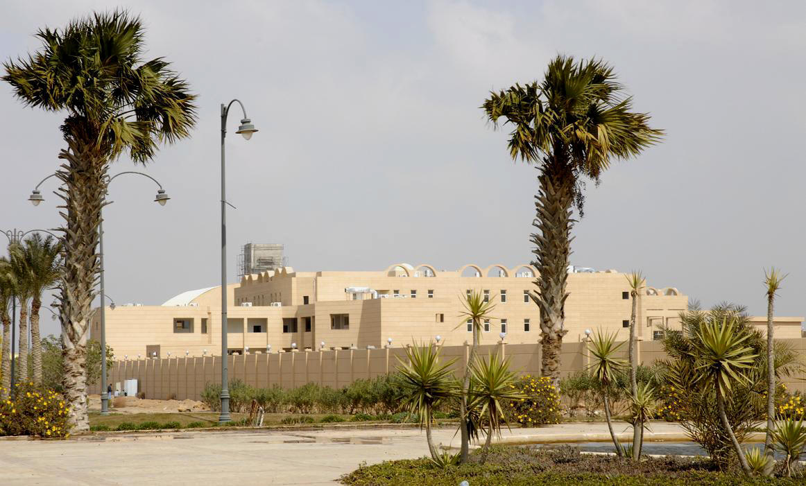 The British International School, Cairo